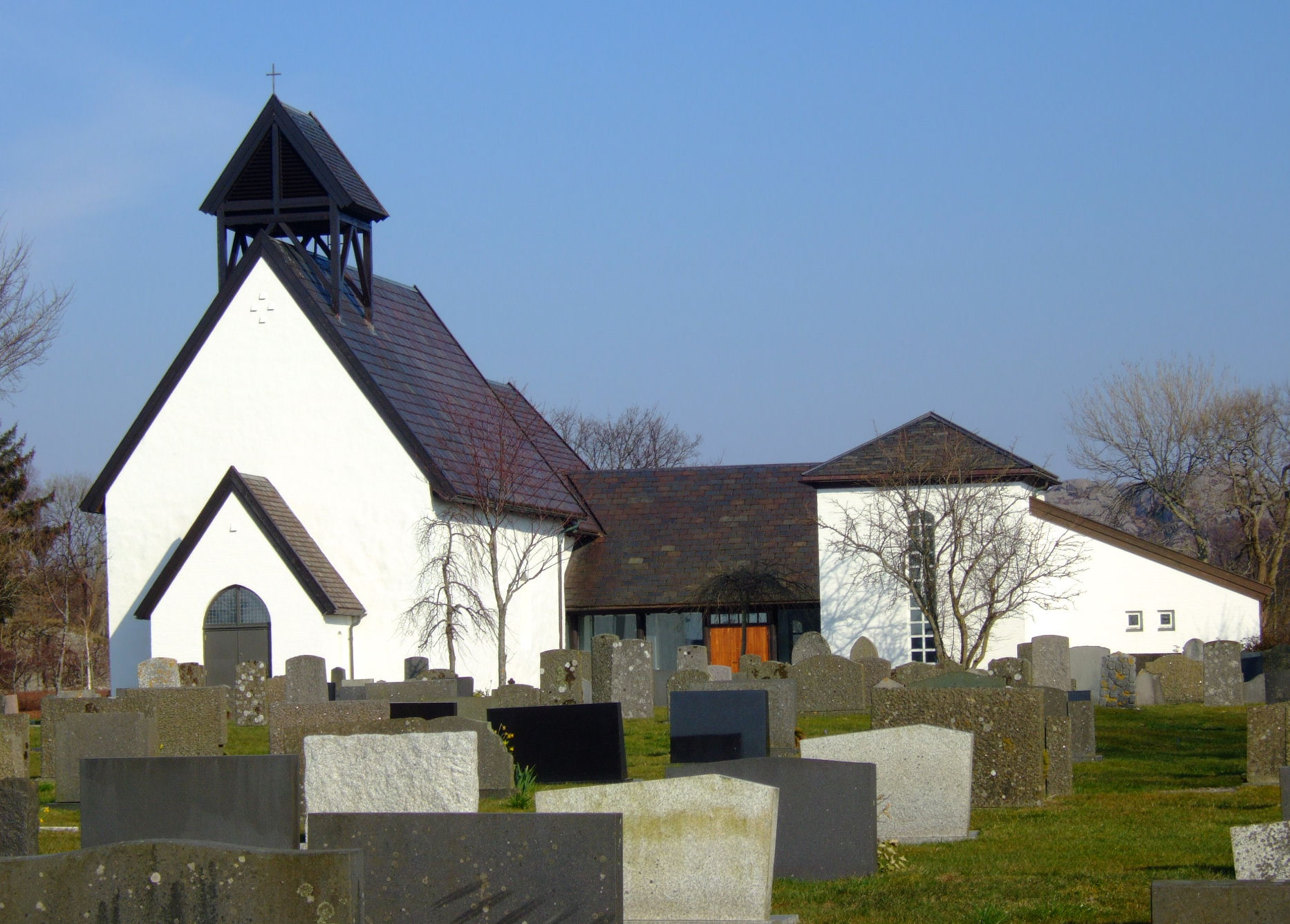 Ogna kirke 2 Rogaland Norway